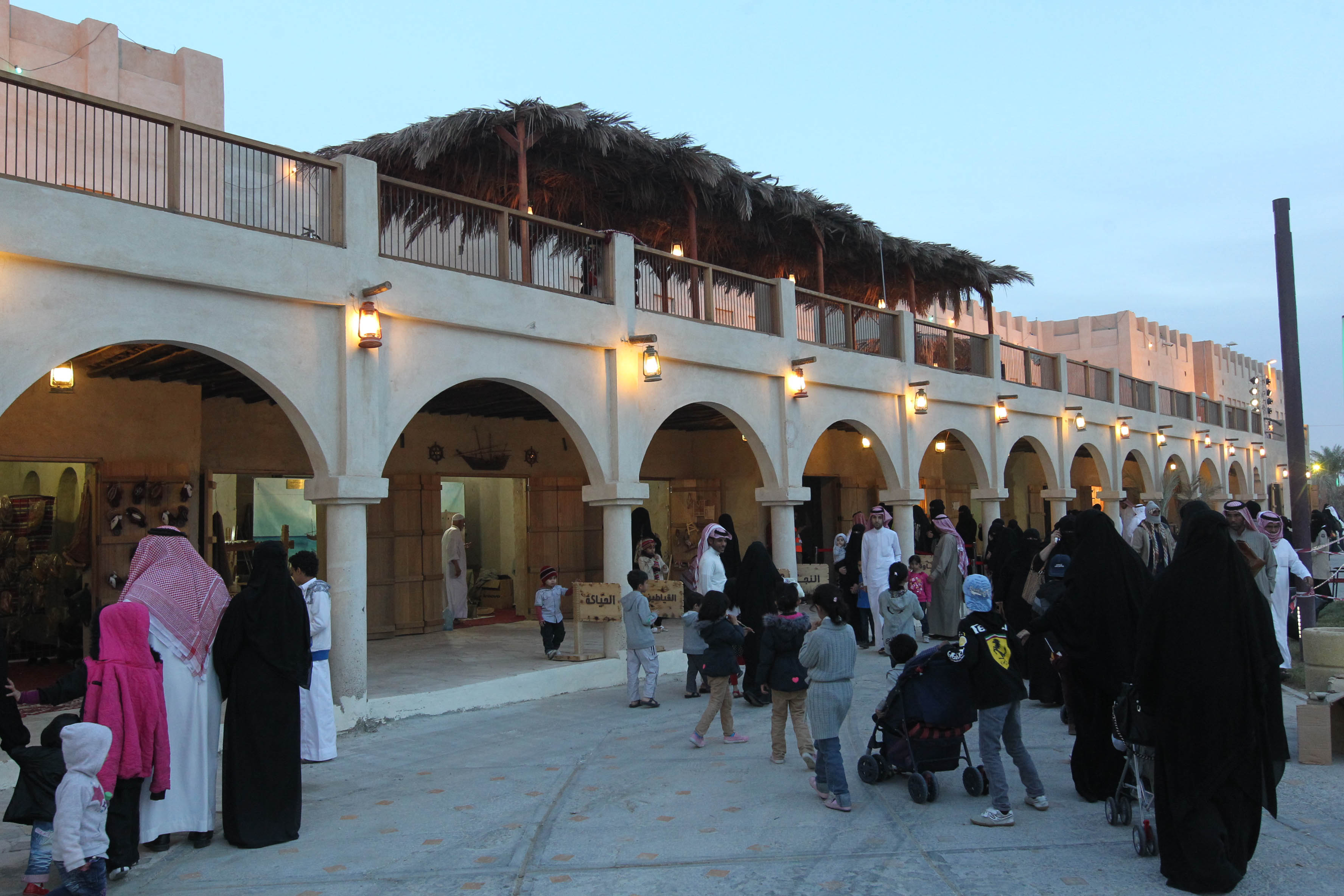 القرية التراثية في برنامج أرامكو السعودية الثقافي 2012